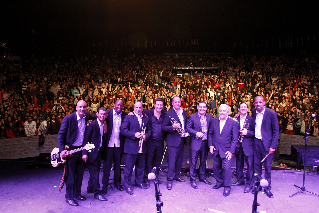 Sonora Borinquen posando con las 18 mil personas asistentes al festival.